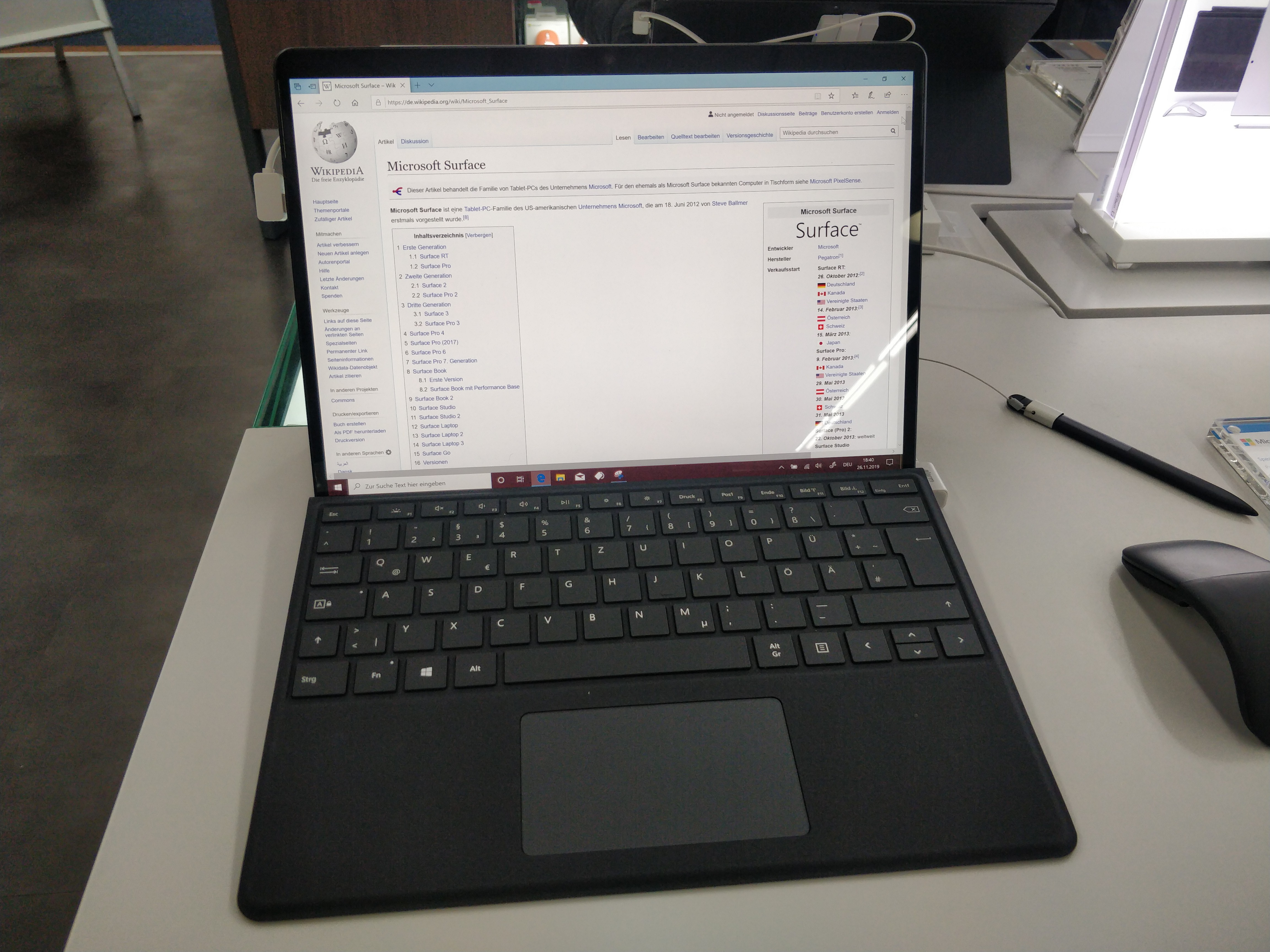 Microsoft Surface Pro X in einem Elektronikfachmarkt